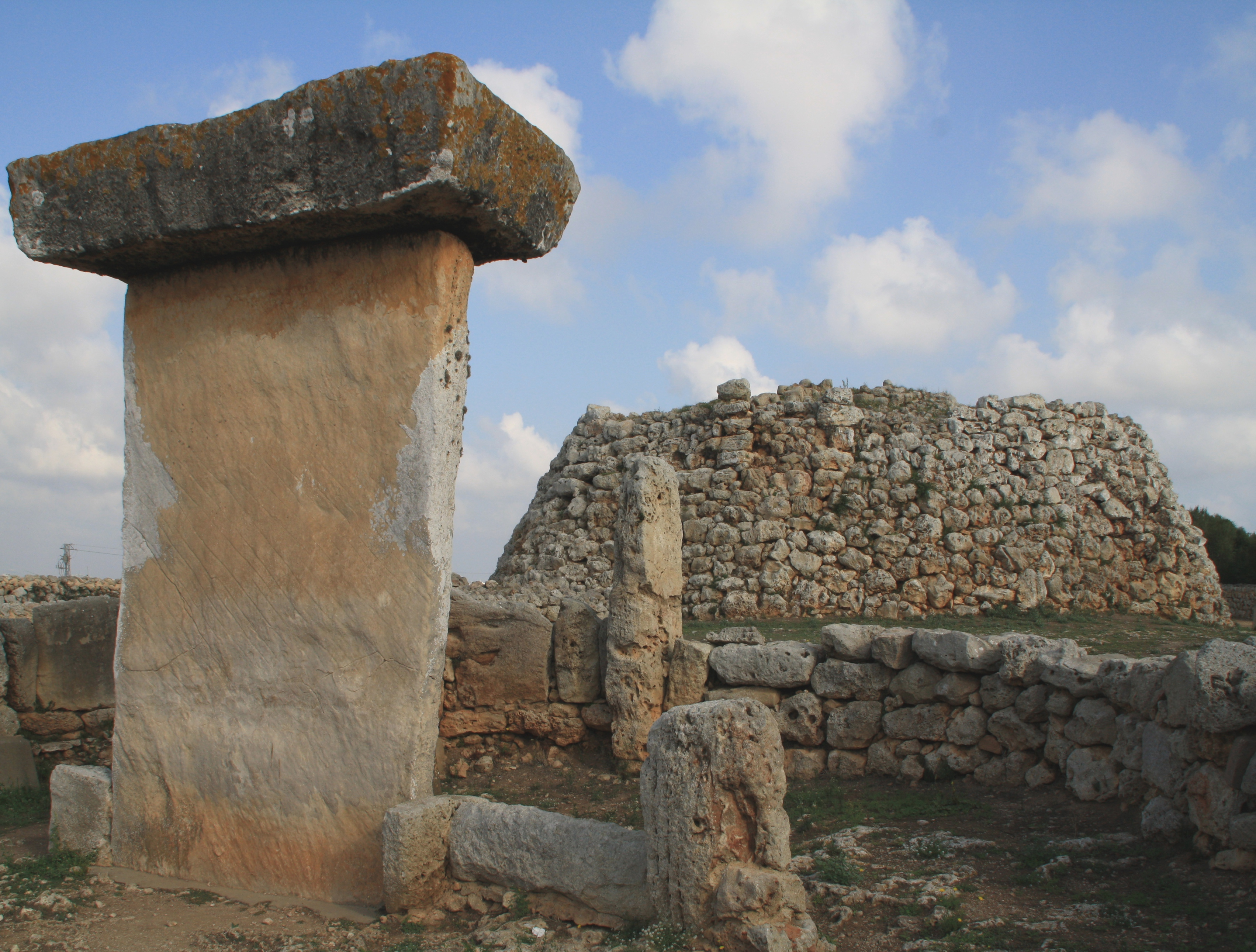 Taula und großer Talayot in Trepucó, Menorca